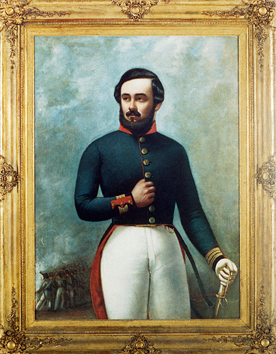 Detalle con soldados en el retrato hecho por Mandiola de Pedro León Gallo (1830-1877), politico chileno, diputado, senador y uno de los fundadores del Partido Radical.